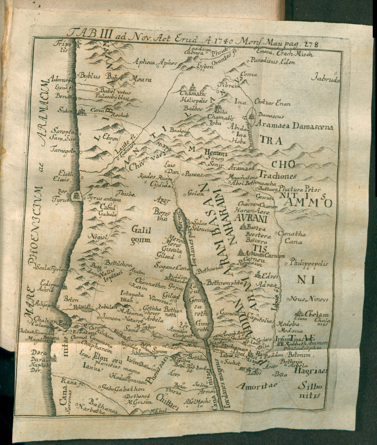 Illustration